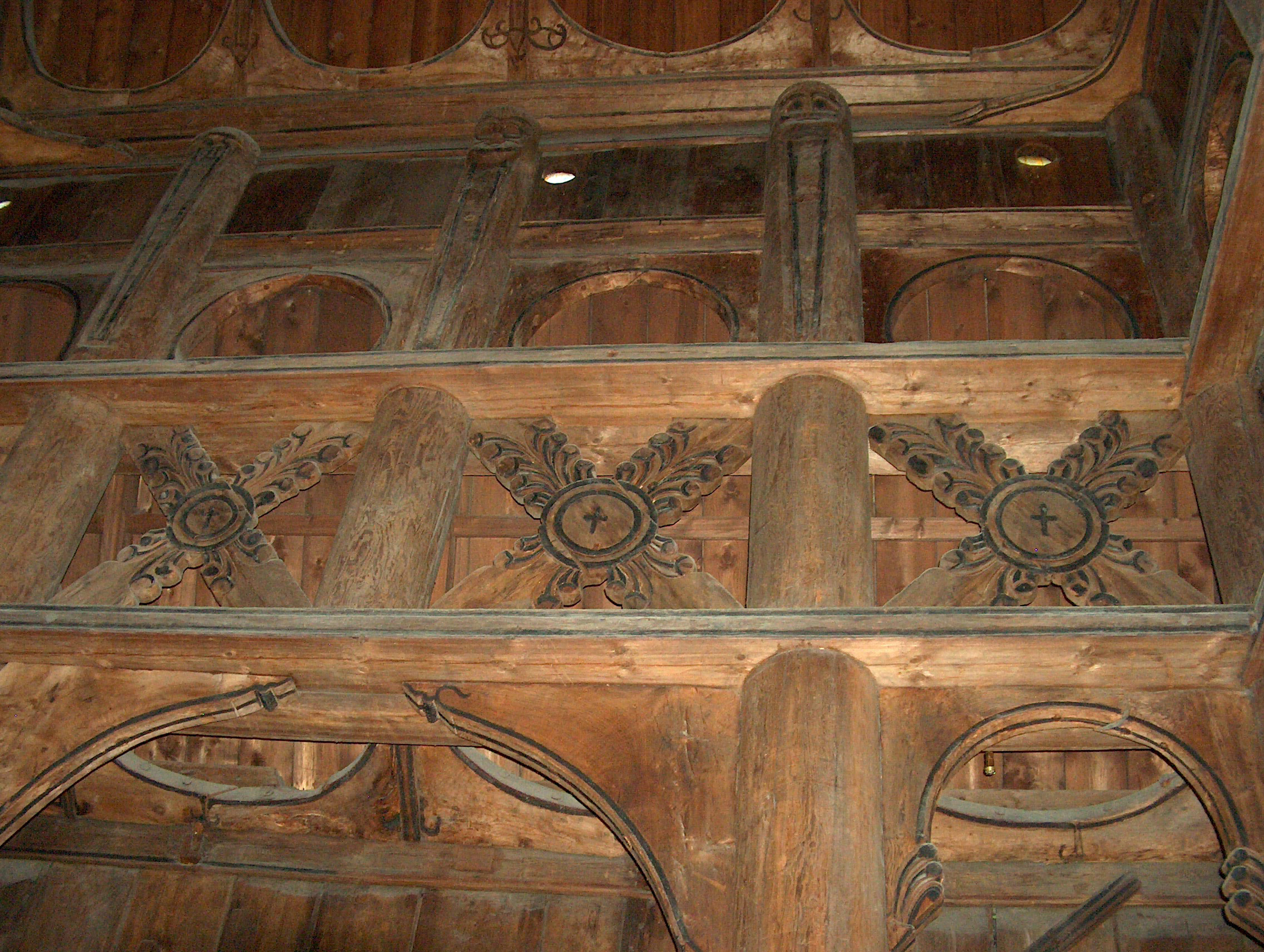 Gol stavkirke, Norsk folkemuseum (interiørdetaljer)